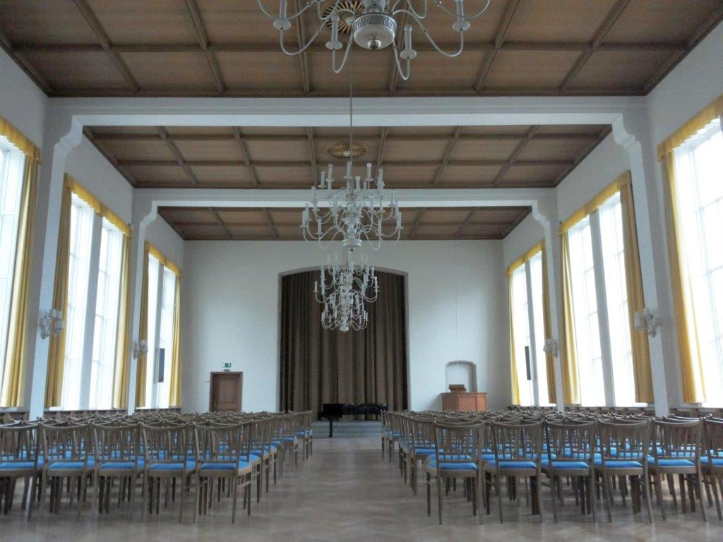 Großer Saal im Pastoren- und Gemeindehaus zur Bürgermeister-Smidt-Gedächtniskirche.